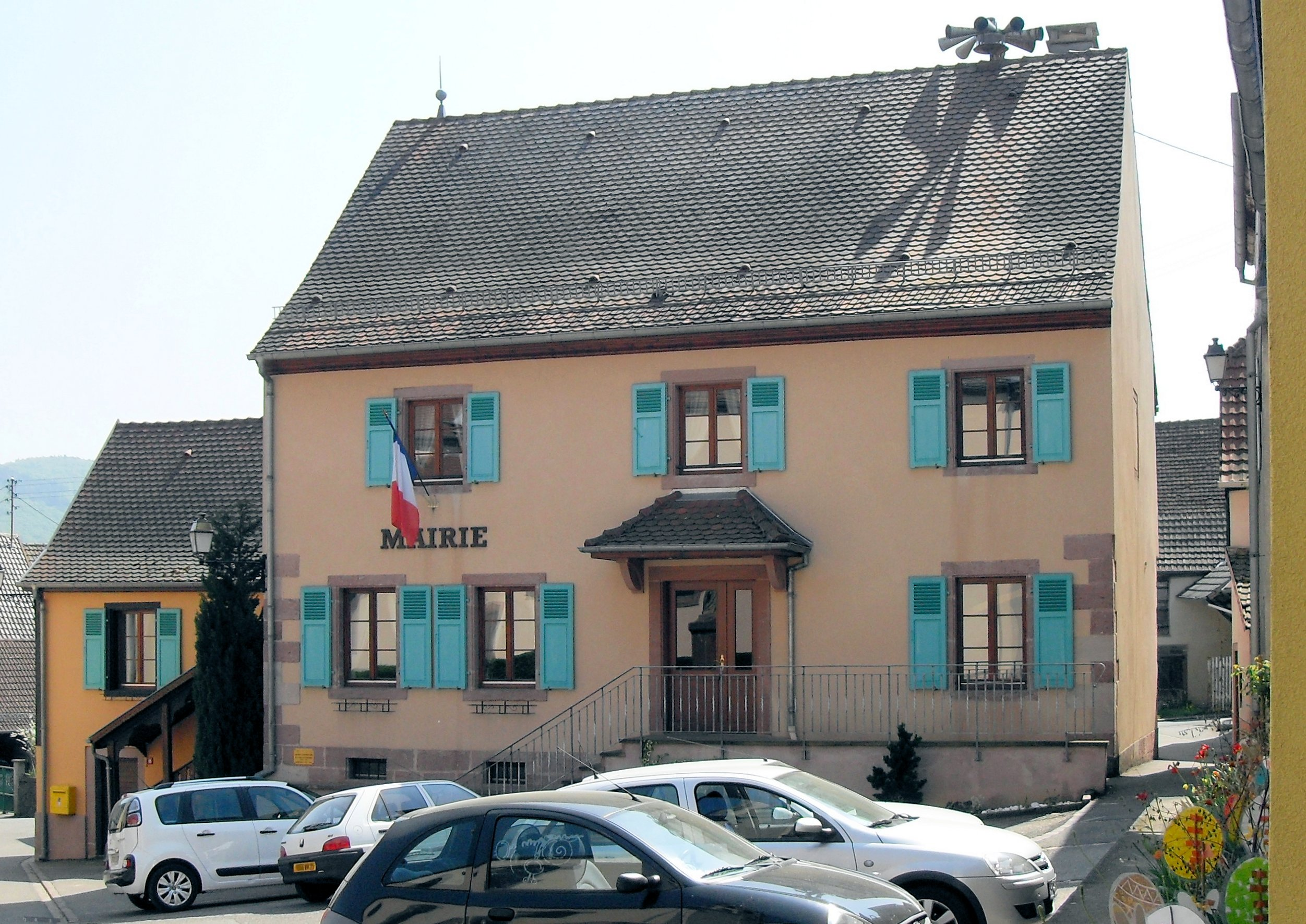 La mairie de Zimmerbach